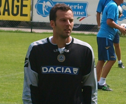 Samir Handanovic in allenamento